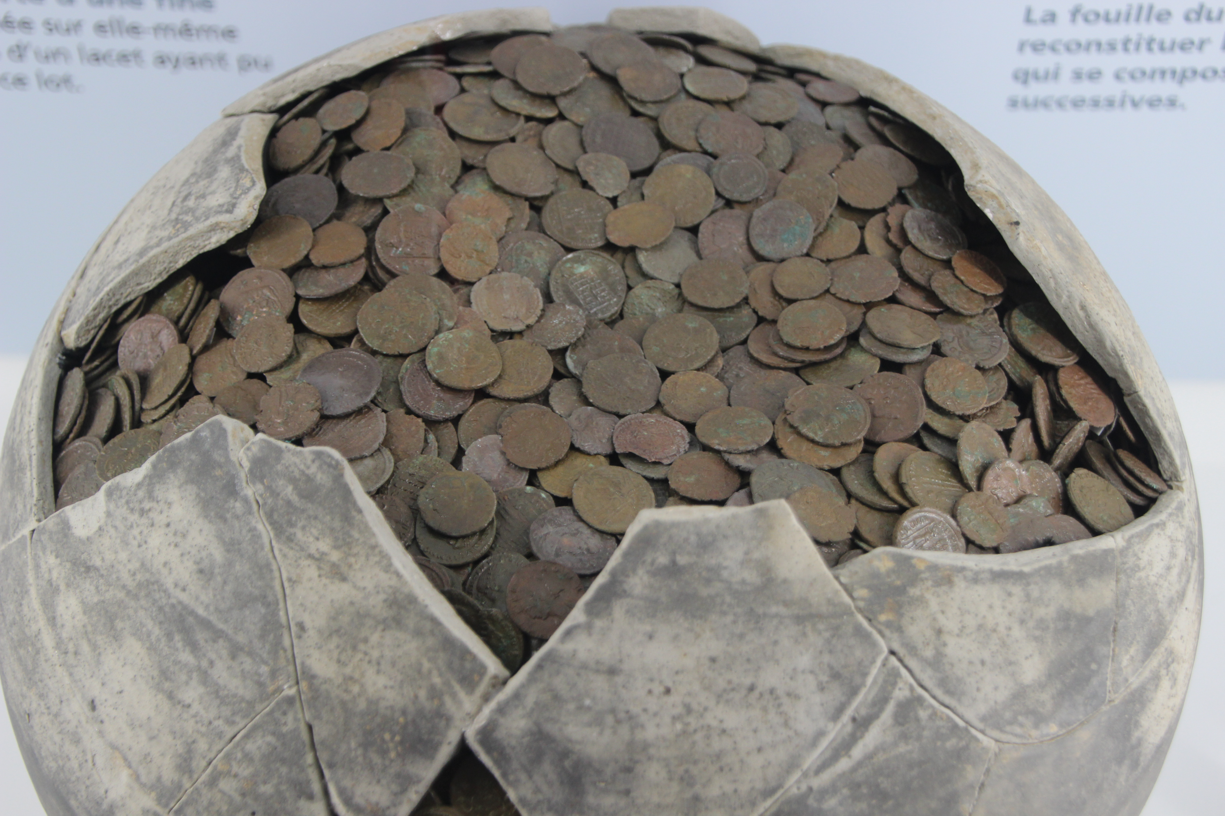 Trésor de Saint-Germain-de-Varreville au Musée de Normandie à Caen